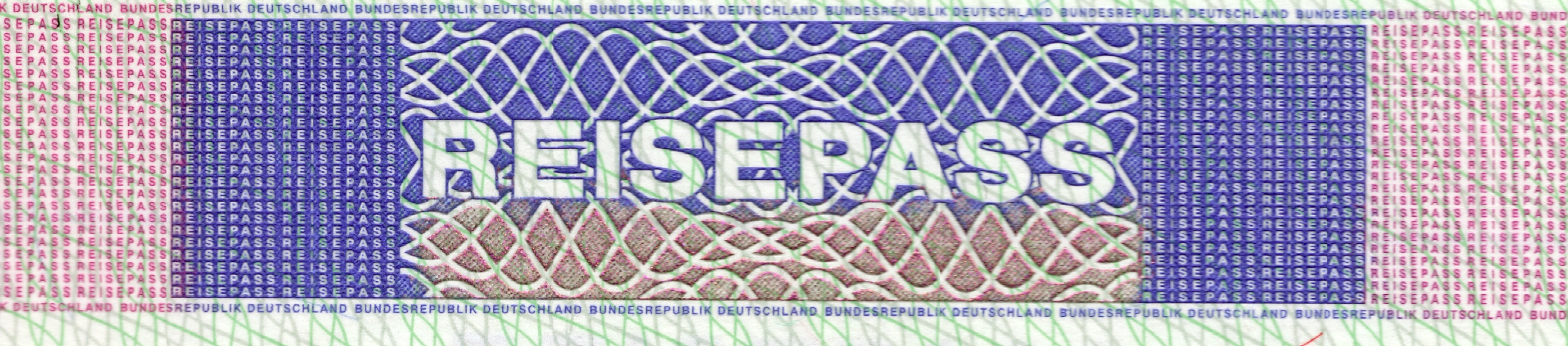 Schriftzug "Reisepass" auf einem Klebeetikett eines vorläufigen Reisepasses